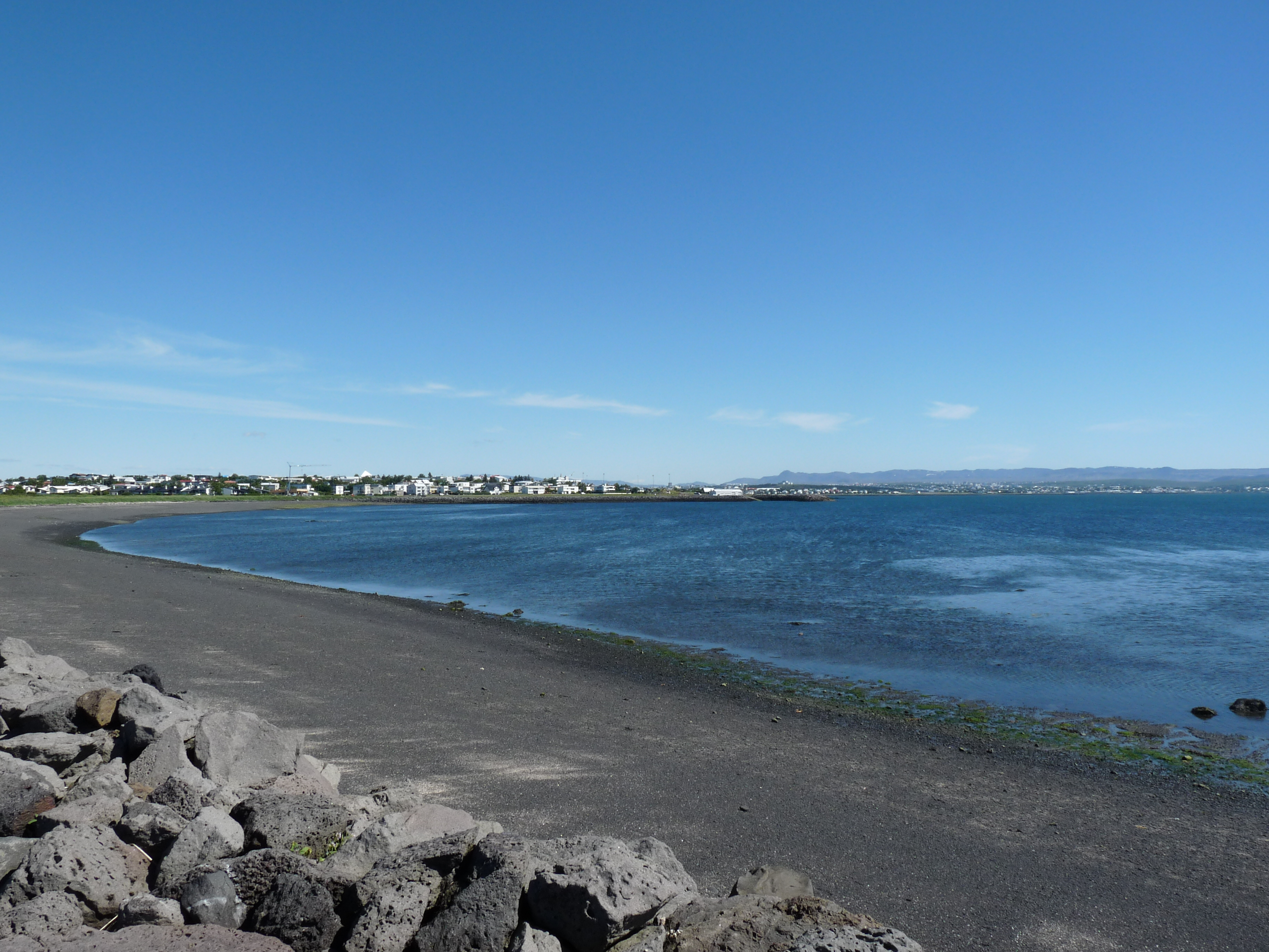 Strand op het schiereiland Seltjarnarnes